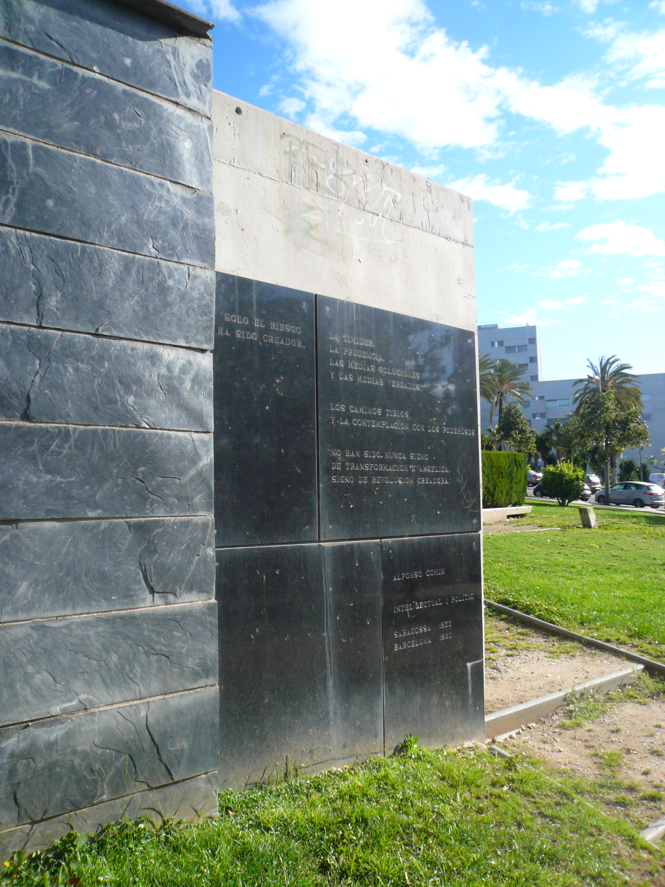 A Alfons Comín. Pl. Alfonso Comín (Barcelona). Arquitecte: Víctor Rahola. Material: arquitectura. 1992. 32″ N, 2° 08′ 16.3″ E